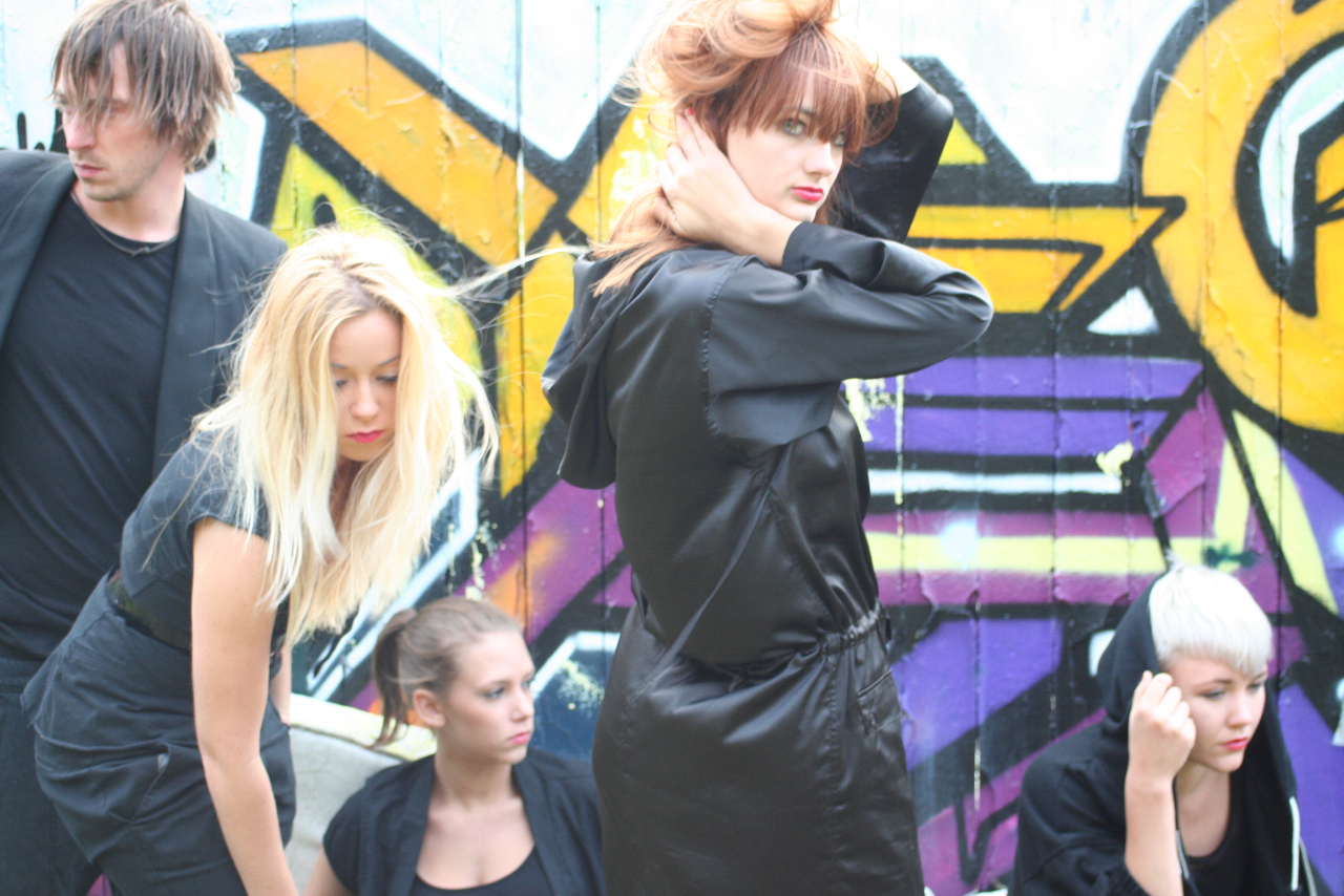 SMDP-Teilnehmer 2010